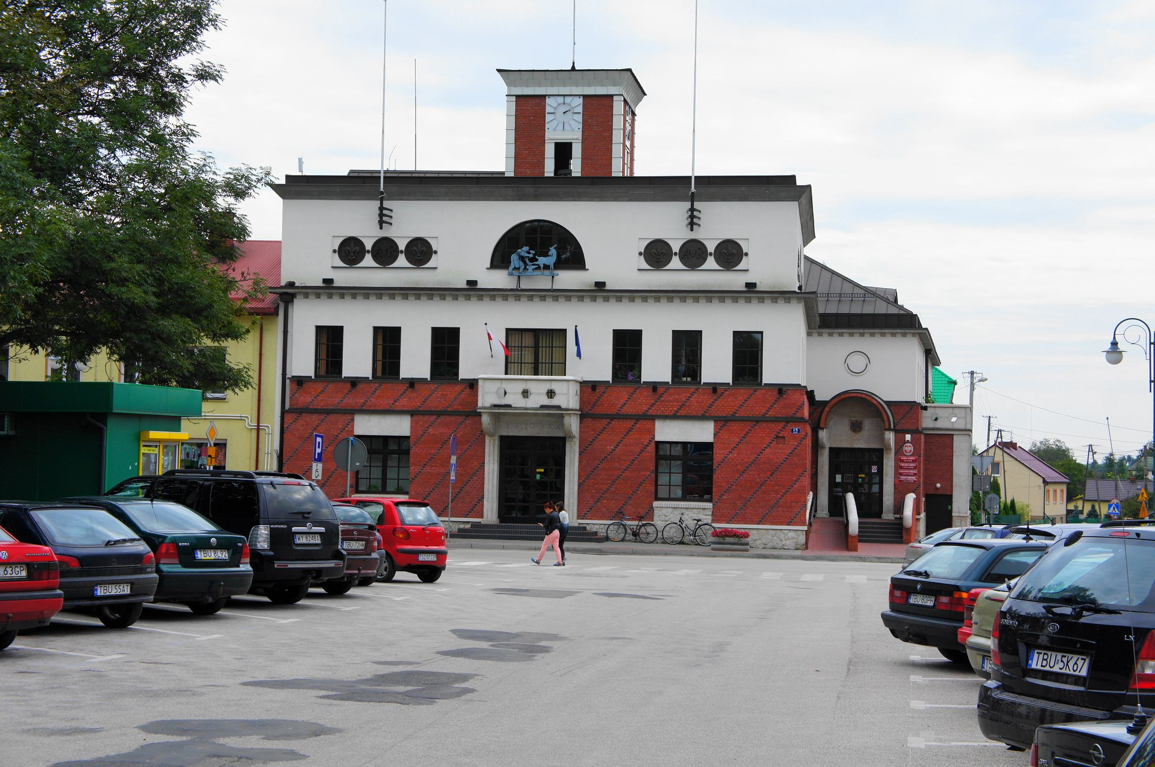 Gmina Pacanów, Poland